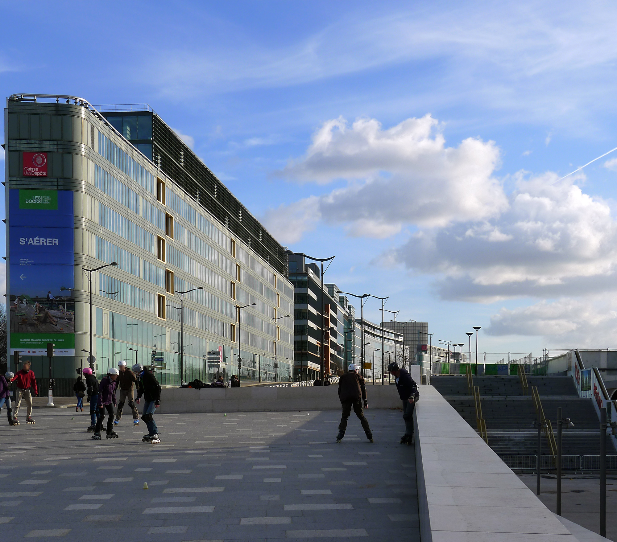 Avenue Pierre-Mendès-France à proximité de la gare de Paris-Austerlitz - Paris XIII